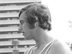 ADN-ZB Gahlbeck 16.7.76 Montreal: XXI. Olympische Sommerspiele-Der 34 jährige Geher Hans-Georg Reimann vom SC Dynamo Berlin (M.), der bereits das vierte mal an Olympischen Spielen teilnimmt und 1972 über 20 km die Bronzemedaille gewann, wird zur feierlichen Eröffnung am 17.7. die DDR-Fahne in das Montraler Olympiastadtion tragen. Unser Foto zeigt ihn auf den Straßen des Olympischen Dorfes im Gespräch mit seinen Mannschaftskameraden Karl-Heinz Stadtmüller (Gehen, r.) und Waldemar Cierpinski (Marathon).